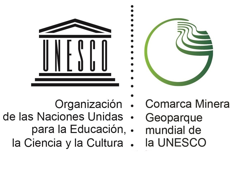 Geoparque de la Comarca Minera